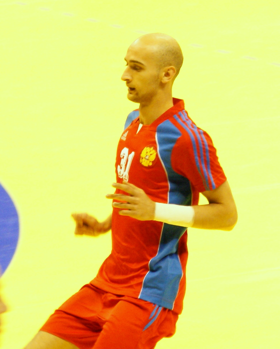 Diborov Mecz Polska - Rosja, Turniej Reprezentacji Narodowych Mężczyzn w Piłce Ręcznej, Hala widowiskowo-sportowa Arena, Poznań, Polska.